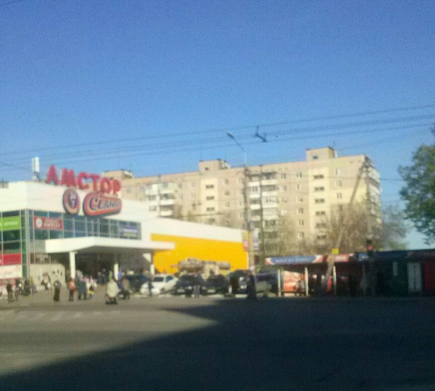 Запоріжжя, Дніпровський район Колишній ТЦ "Амстор"